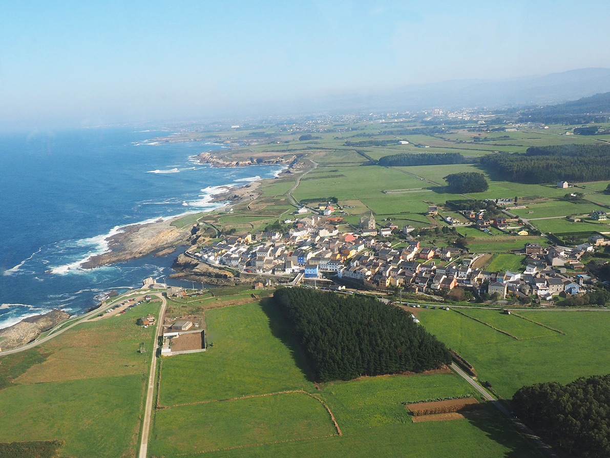 Pequeñu pueblu costeru de la Mariña lucense, Conceyu de Ribadeo.